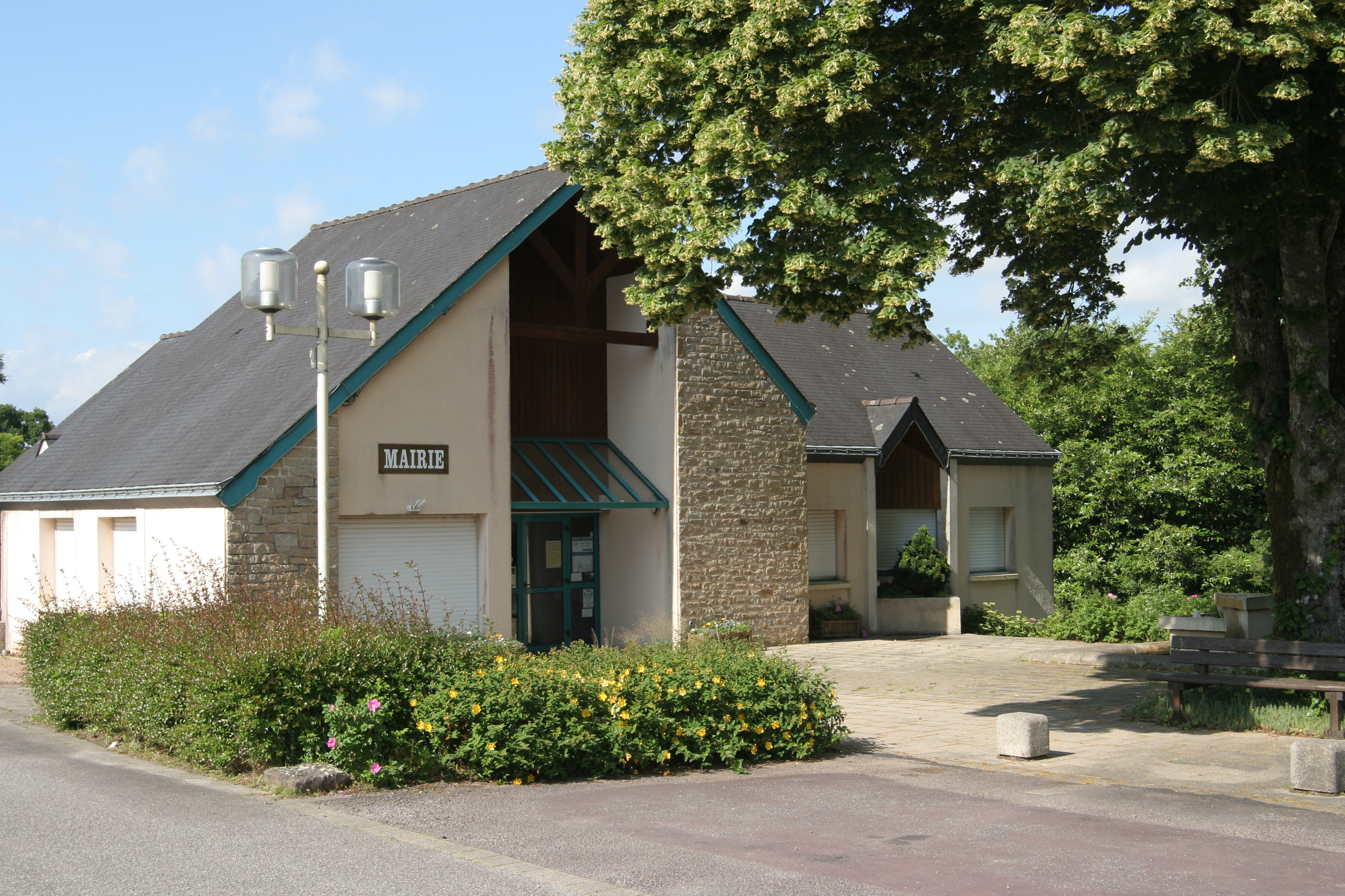 Mairie de BohalBrezhoneg: Ti-kêr Bohal